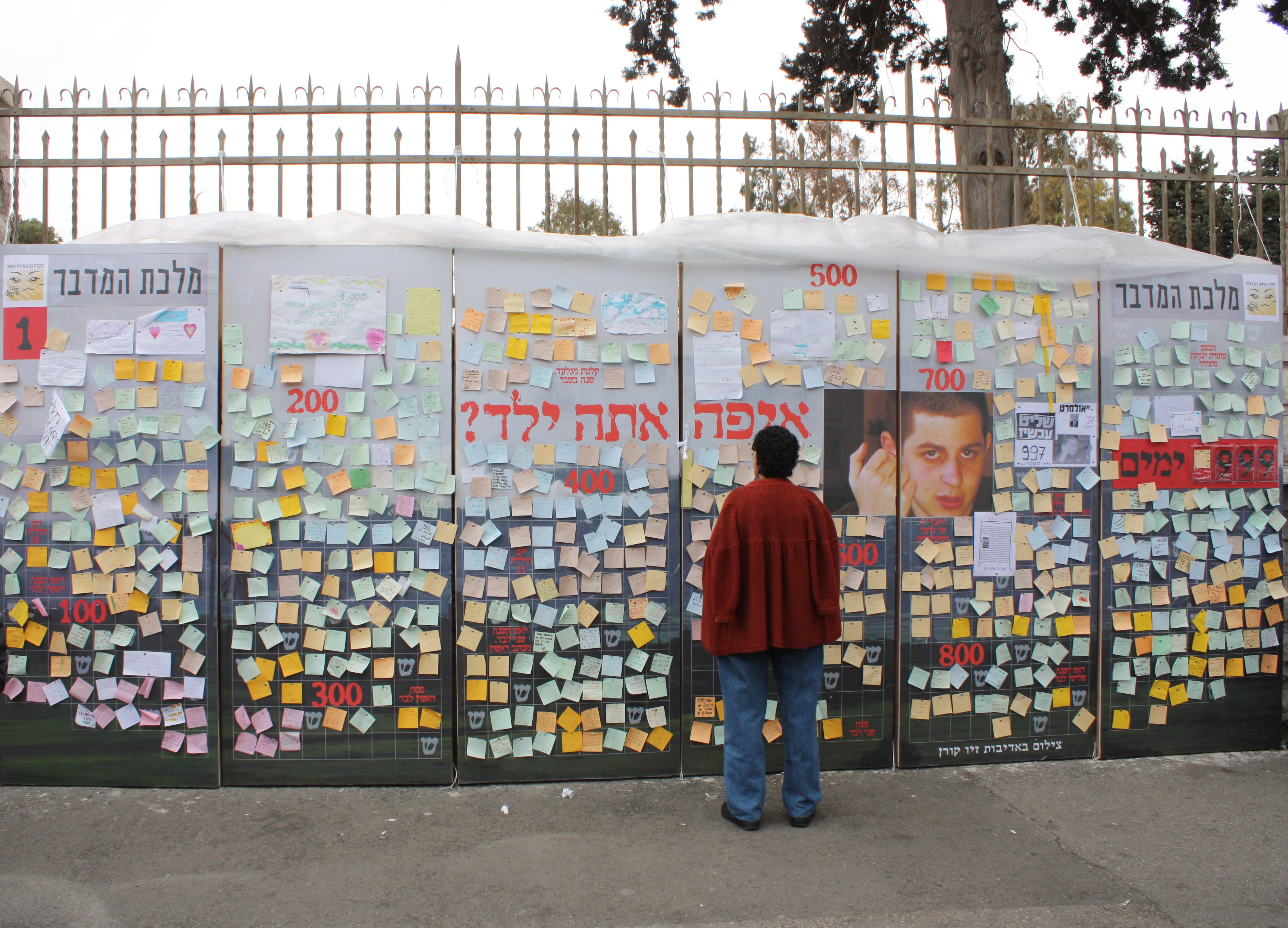 קיר עם פתקים על יד אוהל המחאה של משפחת שליט בסמוך לבית ראש הממשלה